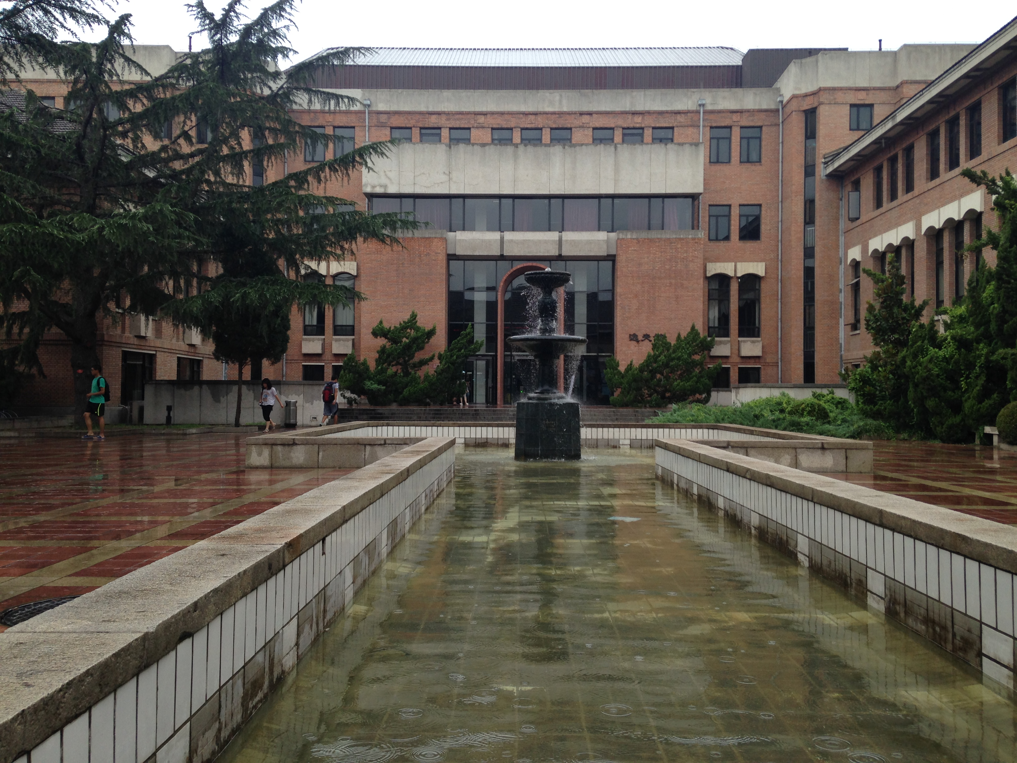 清華大学・図書館